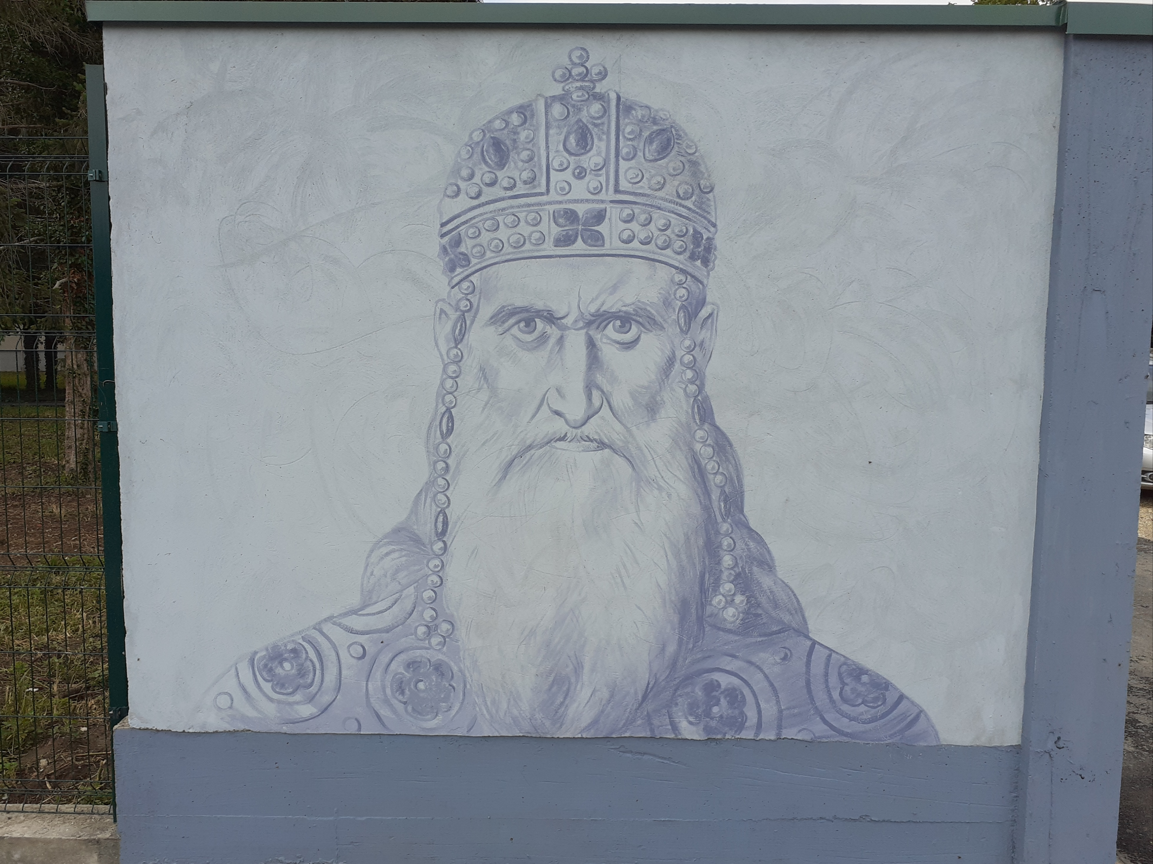 Мурал Стефана Немање у порти Православне цркве у Равњу, град Сремска Митровица.